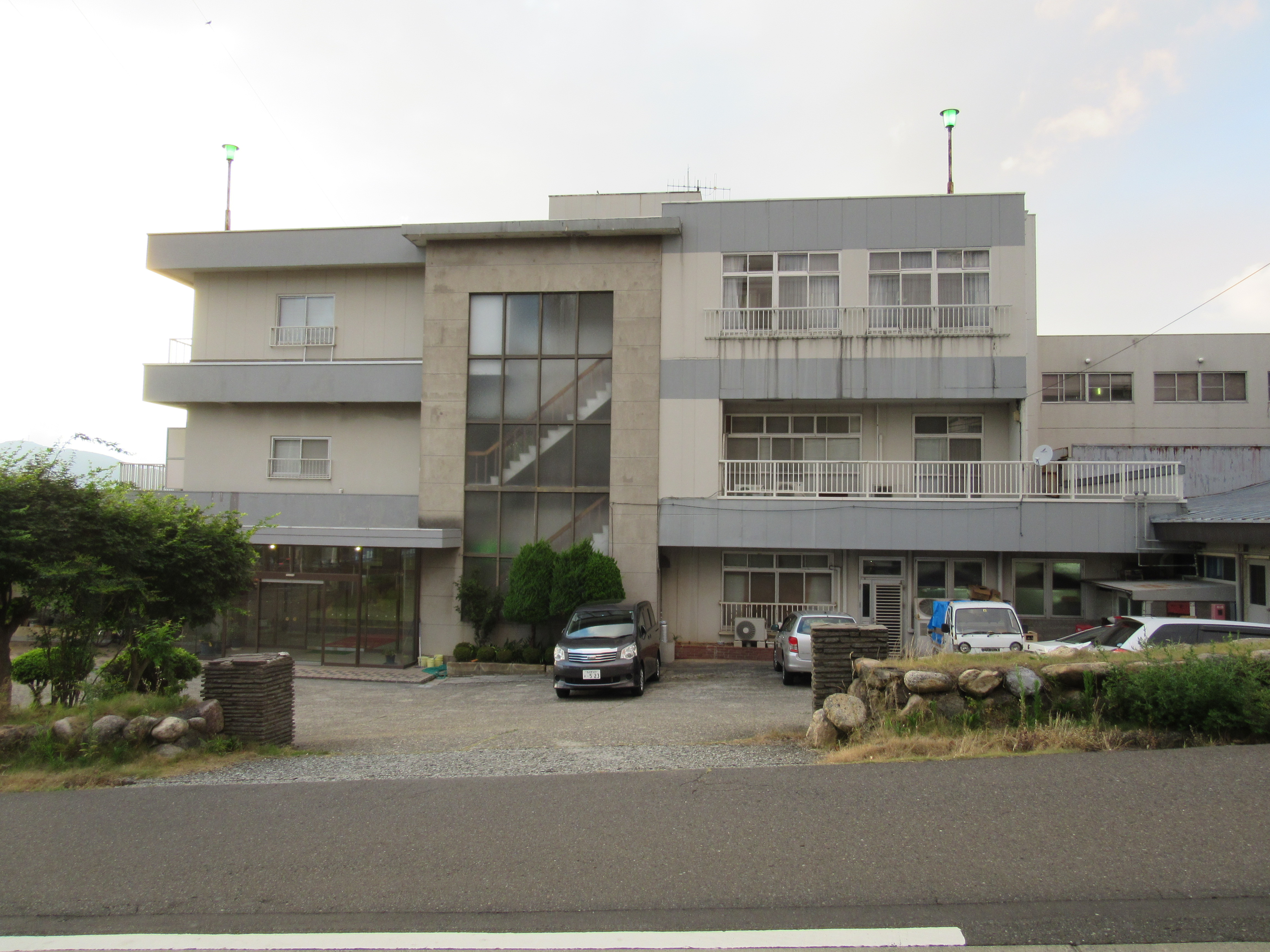 敦賀トンネル温泉・北国グランドホテル